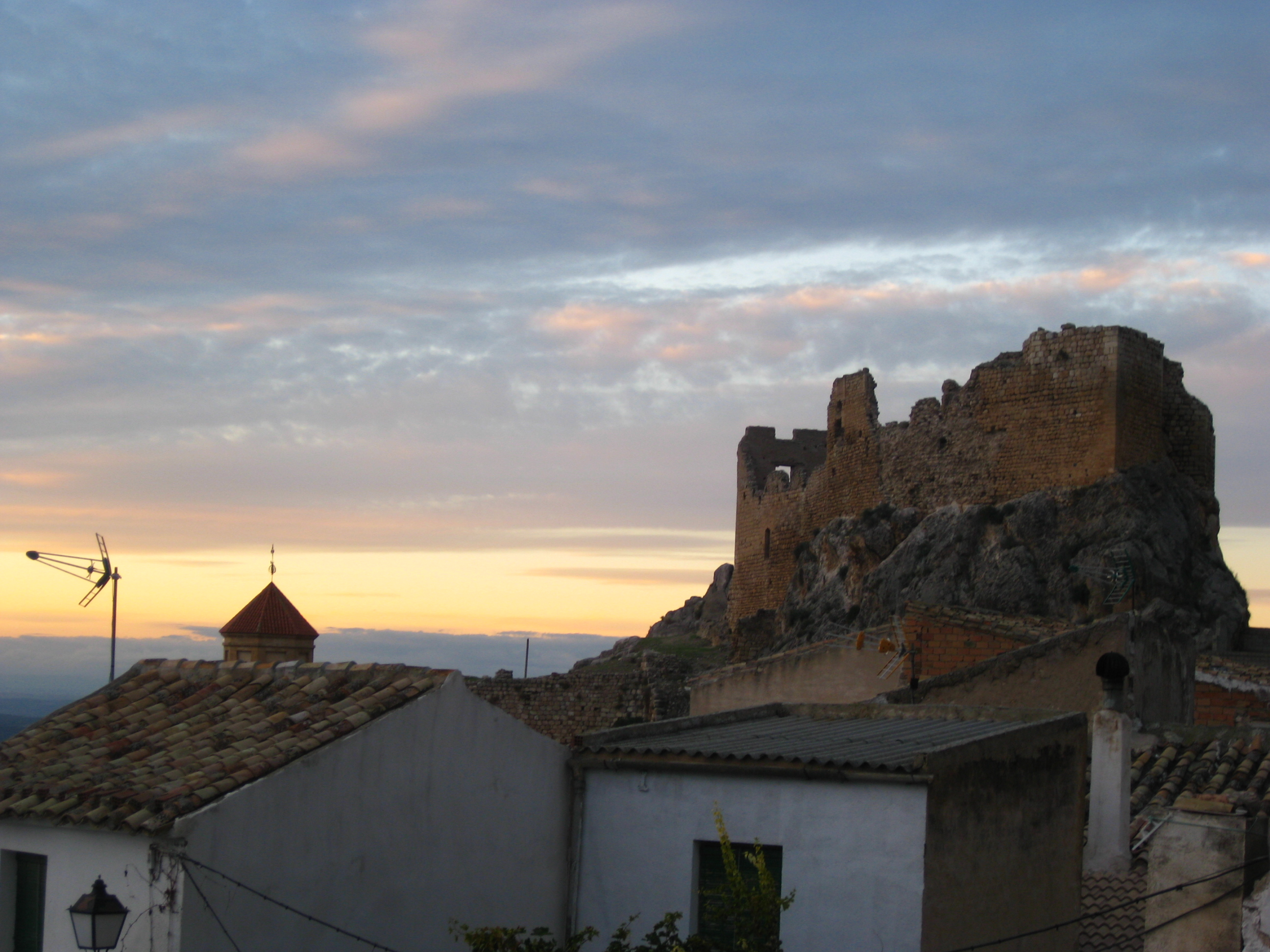 Puesta de sol tras los restos del castillo